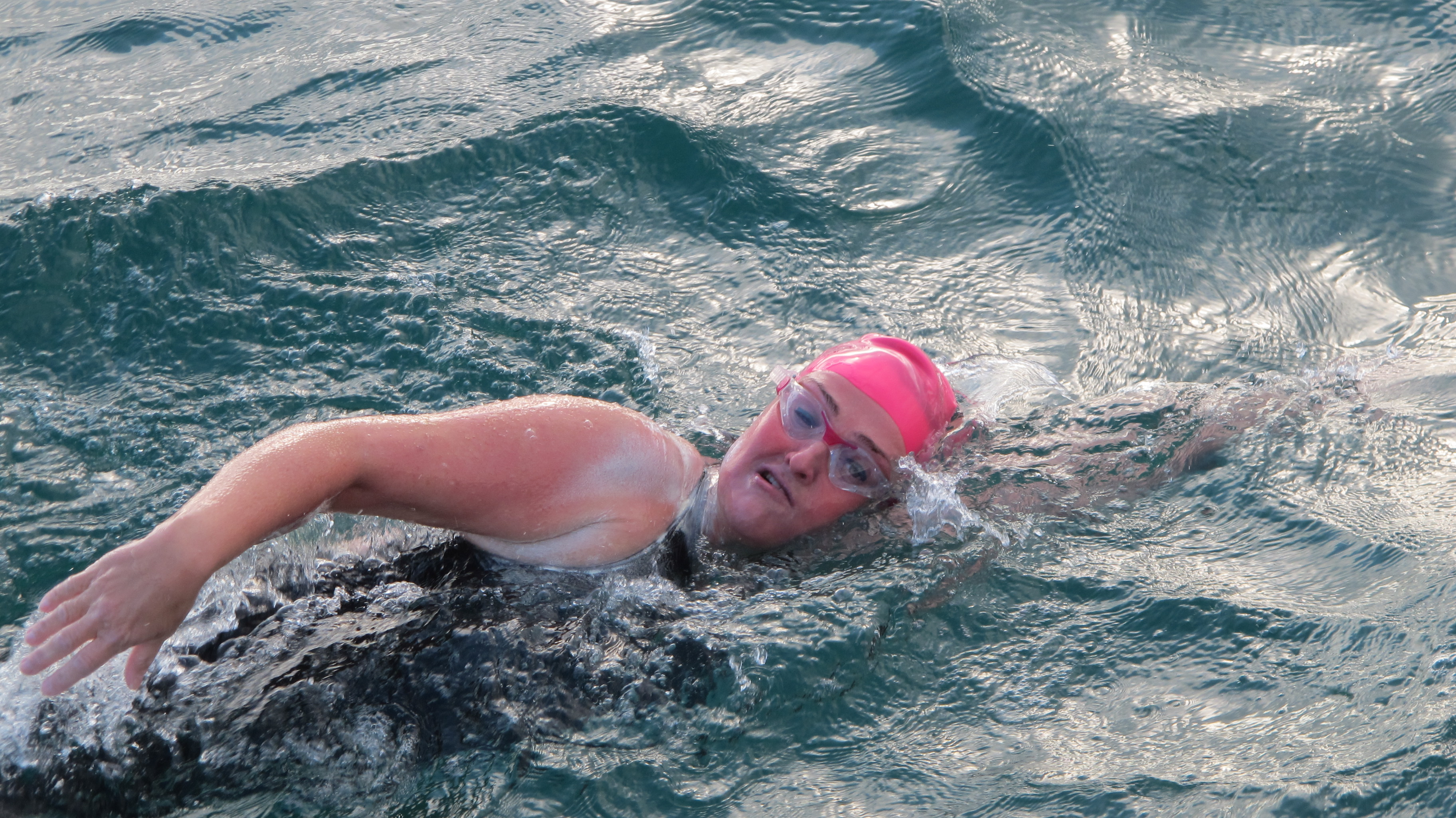 Sigrún að synda yfir Ermarsundið